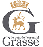 Logo officiel de la Ville de Grasse, sous-préfecture des Alpes Maritimes